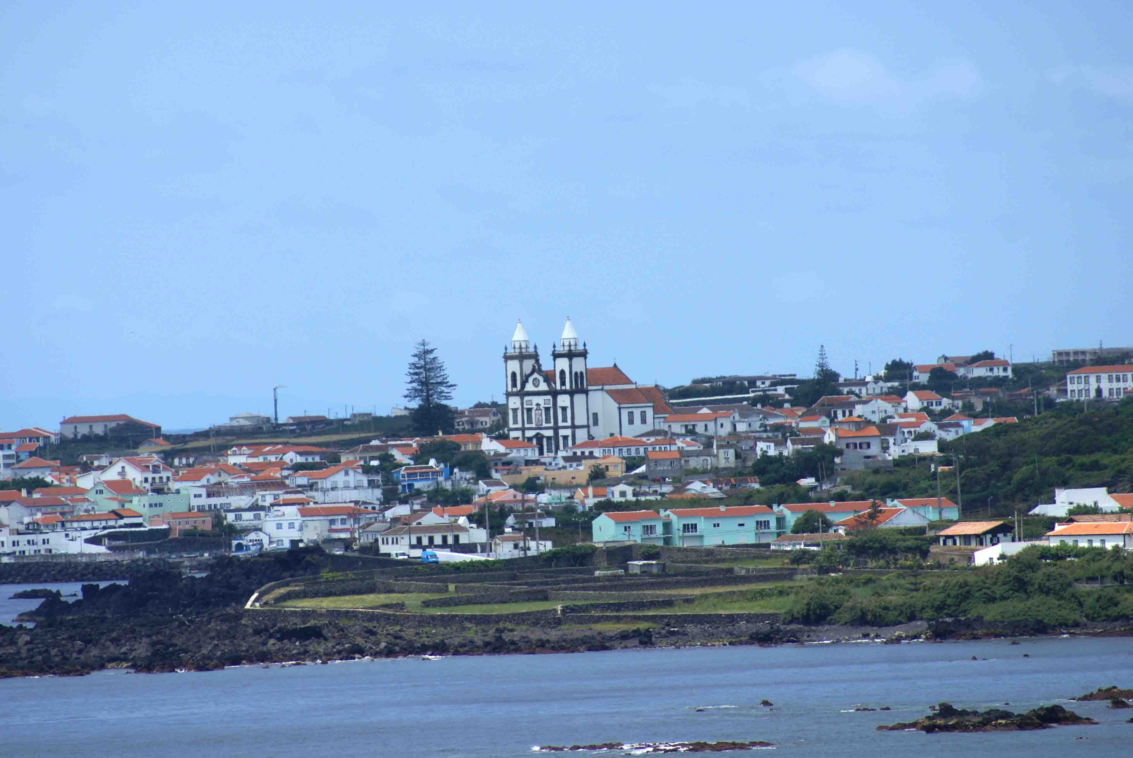 Freguesia de São Mateus da Calheta, Angra do Heroísmo, ilha Terceira, Açores, Portugal